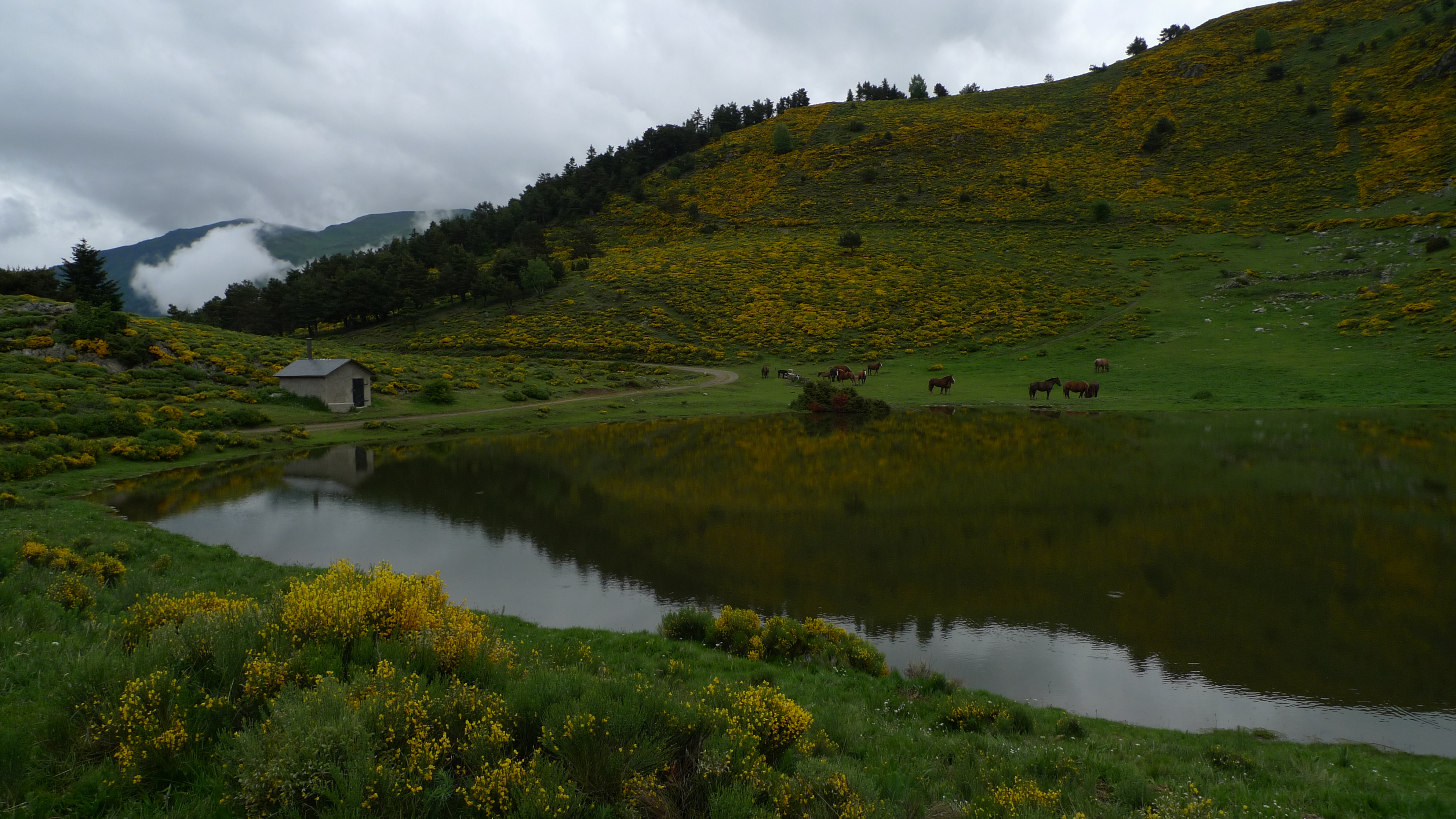 Estany de Viella (Vall d'Aran) This is a a photo of a natural area in Catalonia, Spain, with id: ES510106